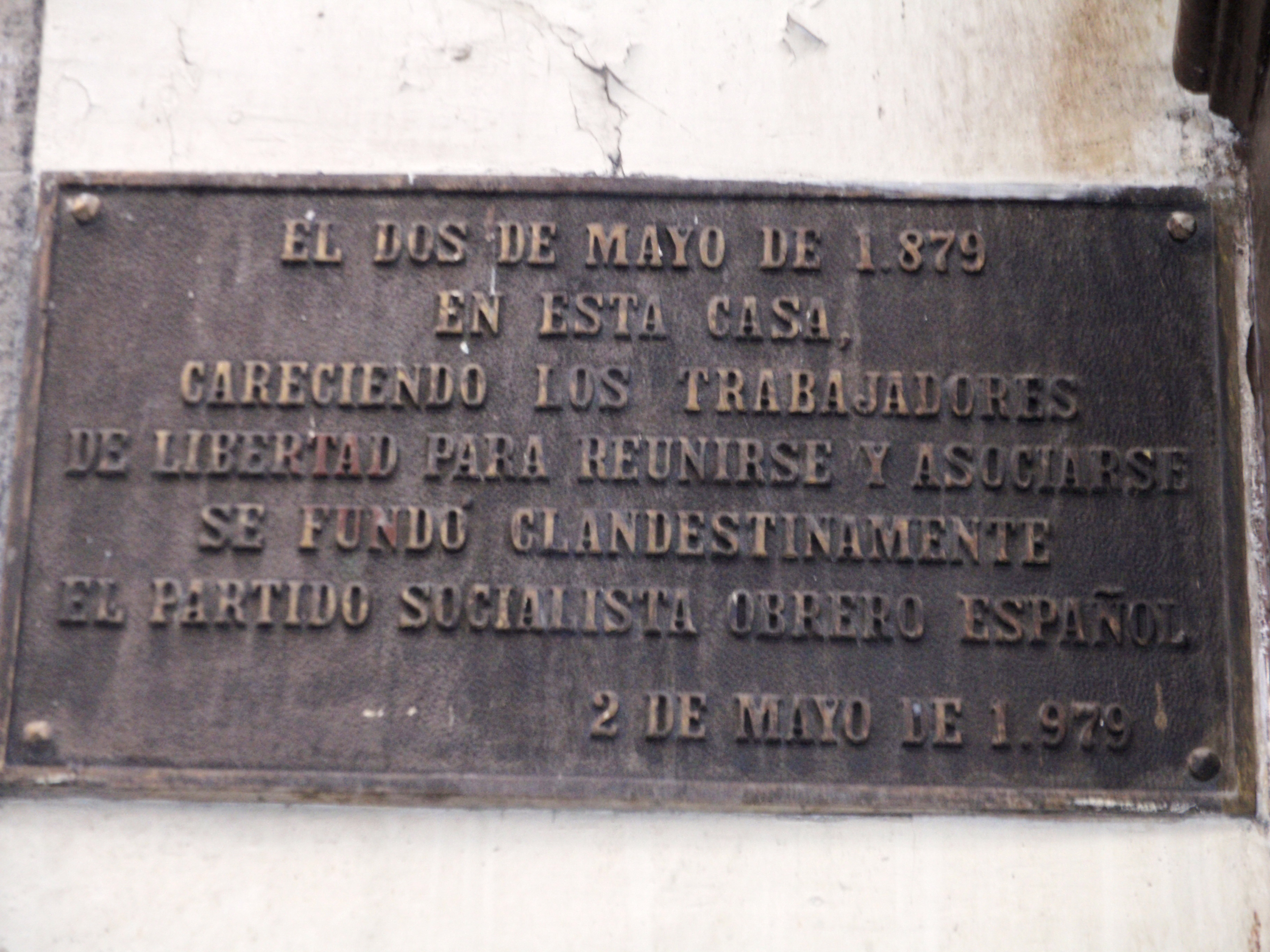 Placa conmemorativa fundación del PSOE en la Calle de Tetuán 12. Madrid.